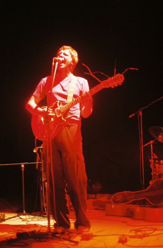 Maciej Cieślak, Ścianka live @ ACK Chatka Żaka, Lublin.